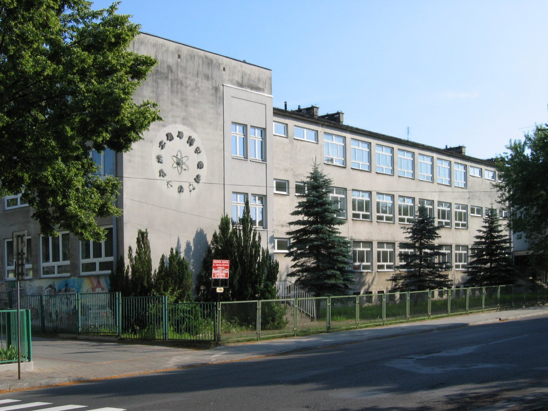 Budynek II Liceum Ogólnokształcącego im. Mikołaja Kopernika w Mielcu